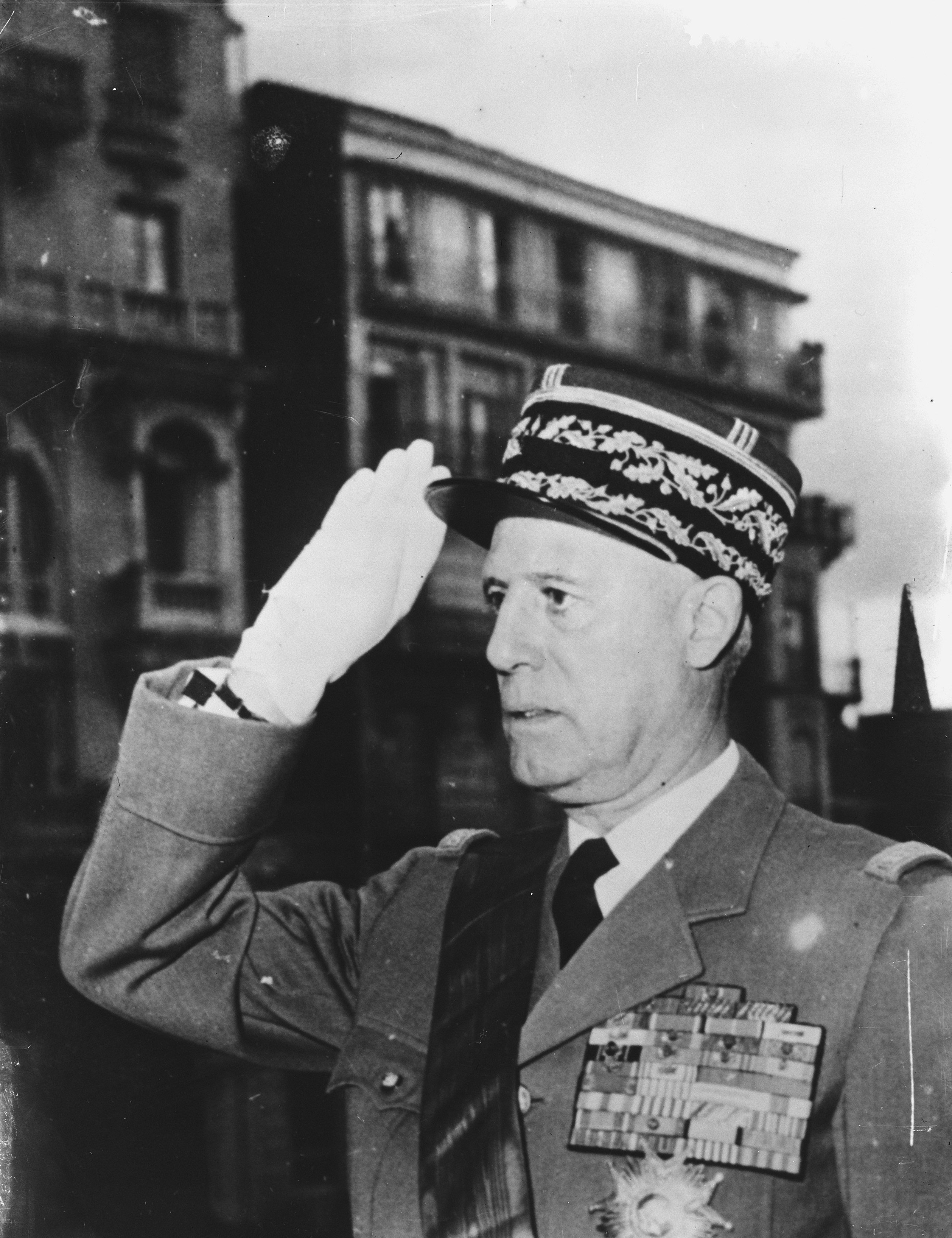 Collectie / Archief : Fotocollectie Anefo Reportage / Serie : [ onbekend ] Beschrijving : Generaal Salan Datum : 14 mei 1958 Fotograaf : Fotograaf Onbekend / Anefo Auteursrechthebbende : Nationaal Archief Materiaalsoort : Glasnegatief Nummer archiefinventaris : bekijk toegang 2.24.01.09 Bestanddeelnummer : 909-5643